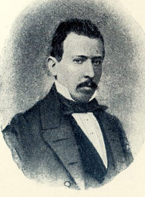 eingescanntes Porträt von Severin Heusch, Aachen